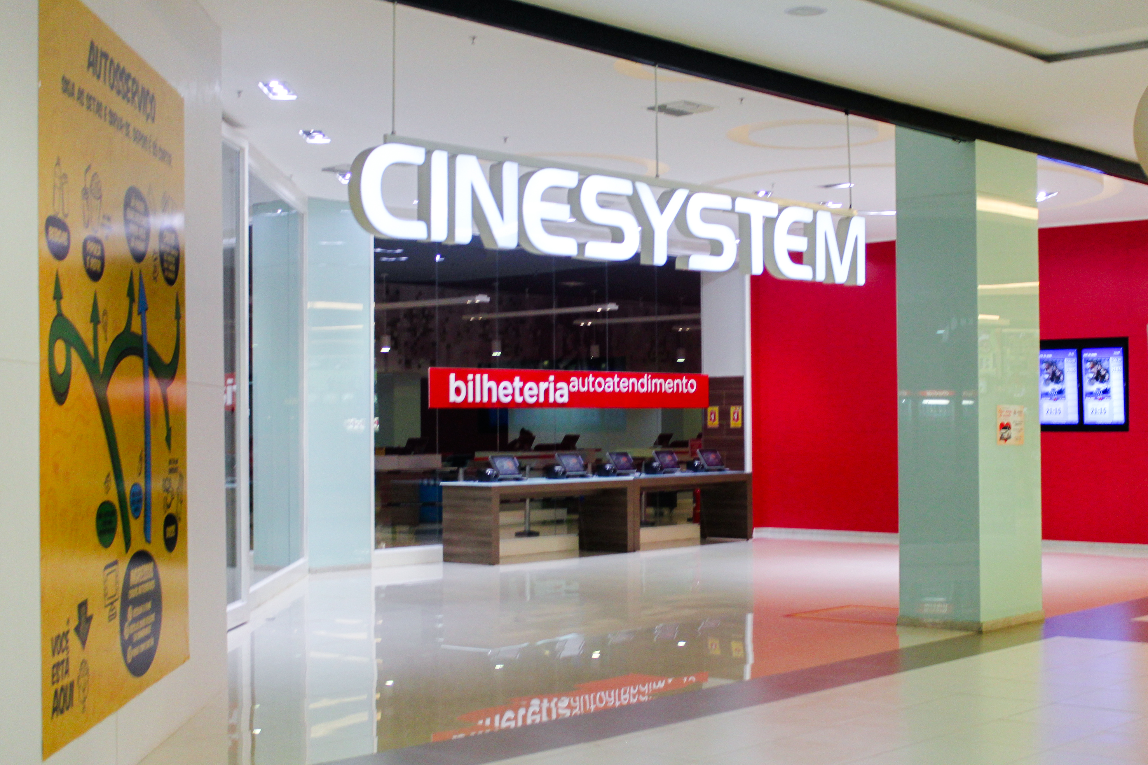 Entrada do Cinesystem do Imperial Shopping de Imperatriz, MA